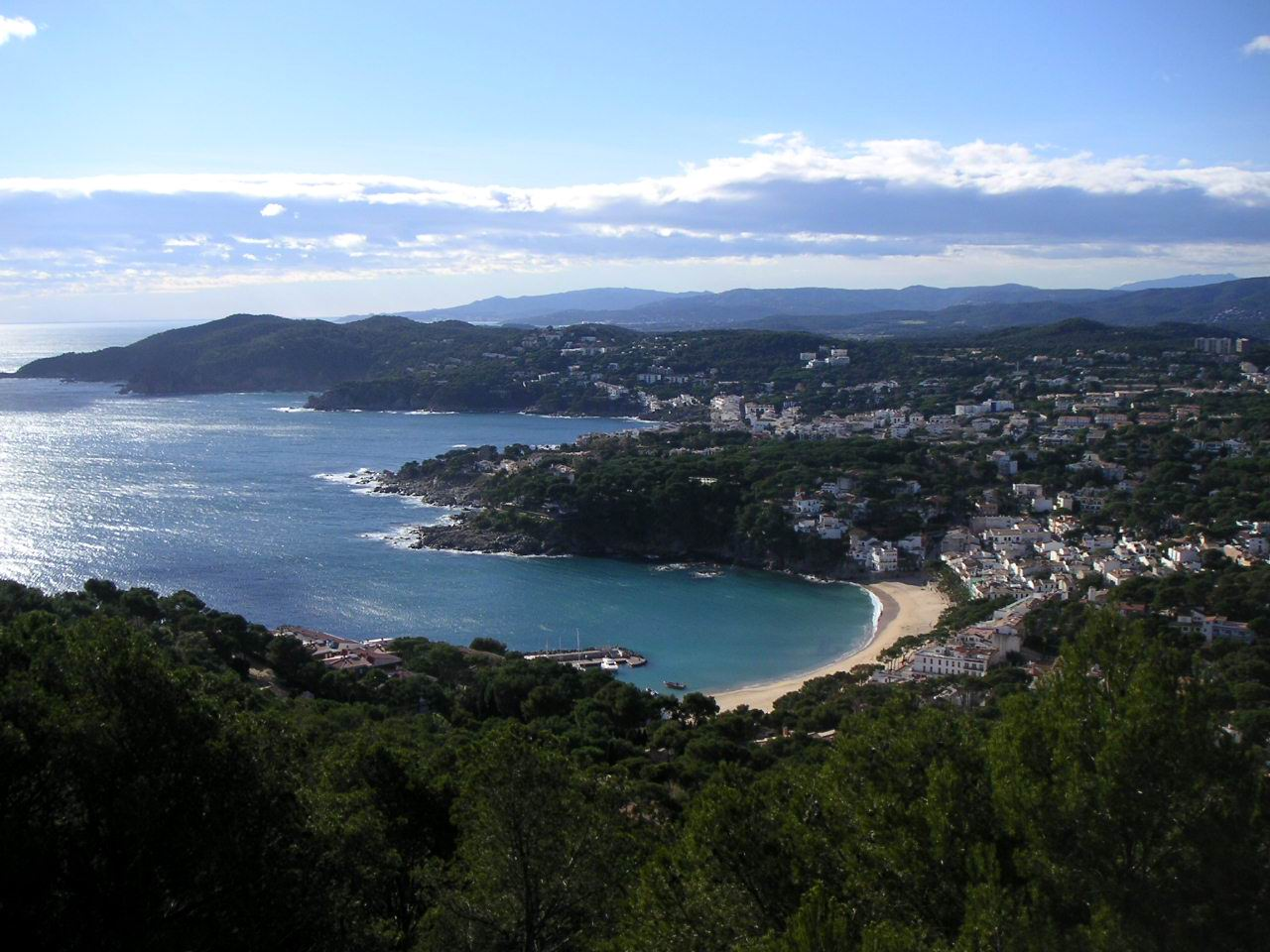 La Costa Brava (se puede ver Calella de Palafrugell y Llafranc)